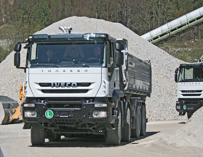 Iveco Trakker 6x8